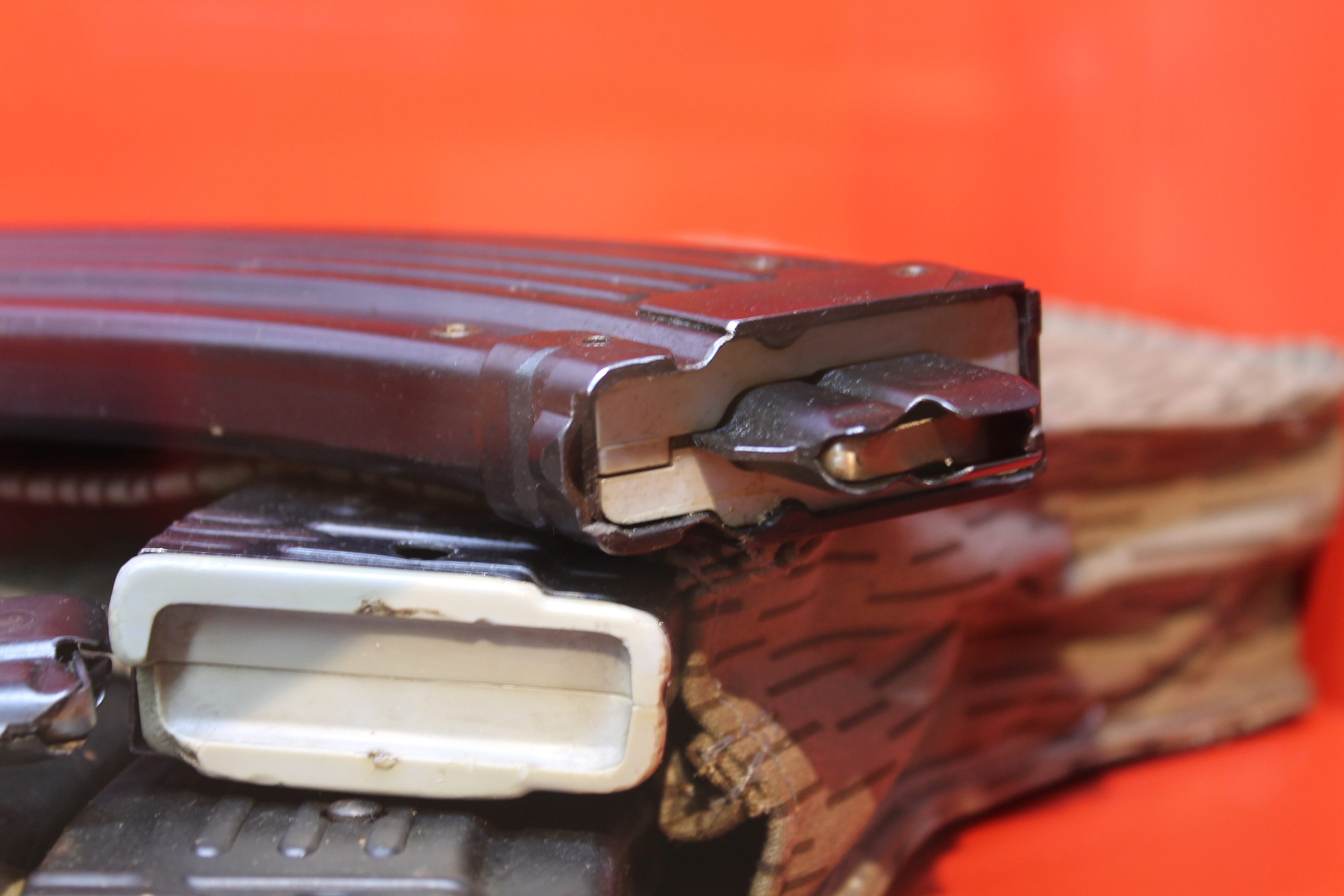 KK-MPi 69 im Waffenmuseum Suhl. Detail Magazine.